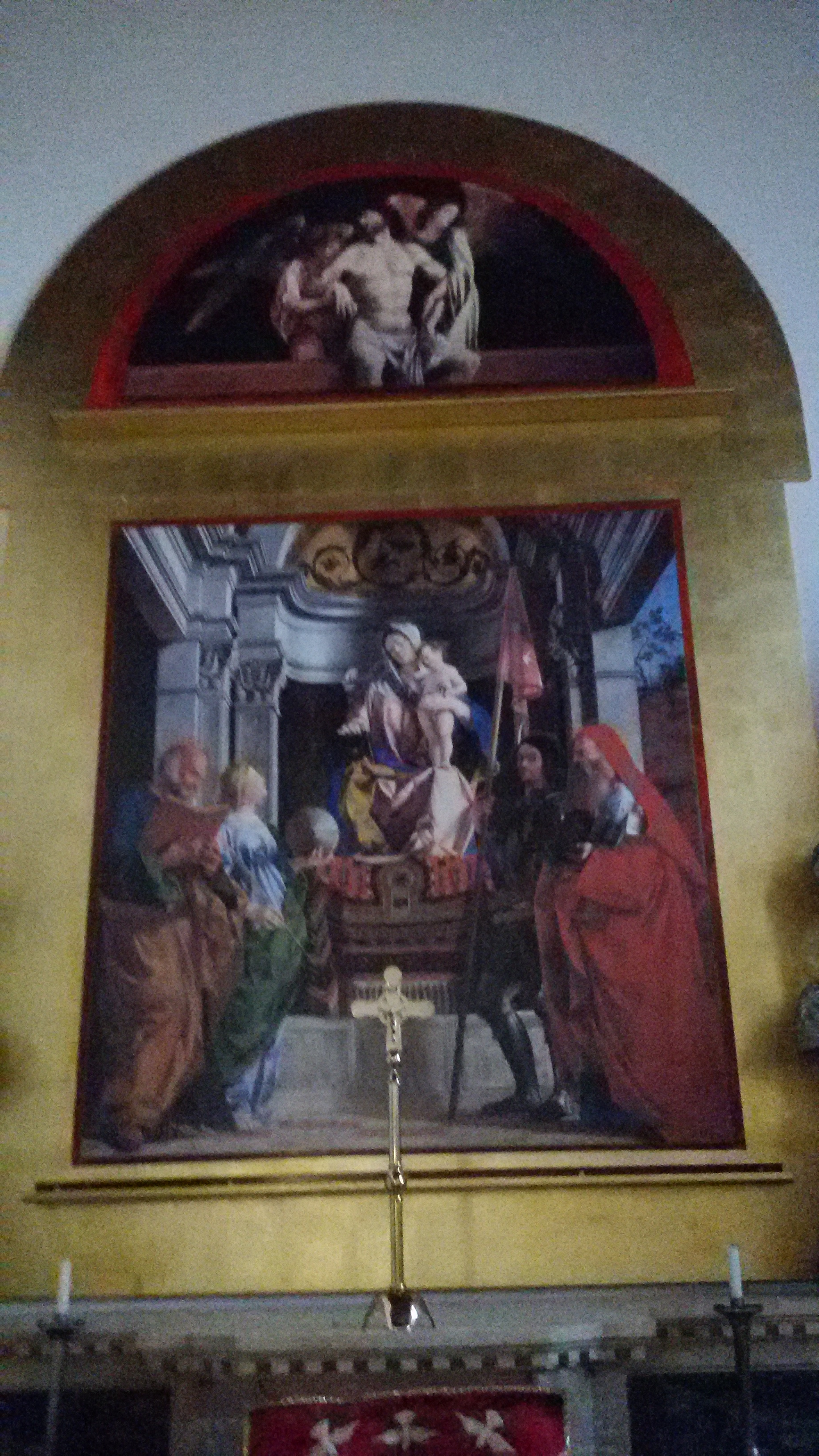 Chiesa di Santa Cristina Quinto di Treviso